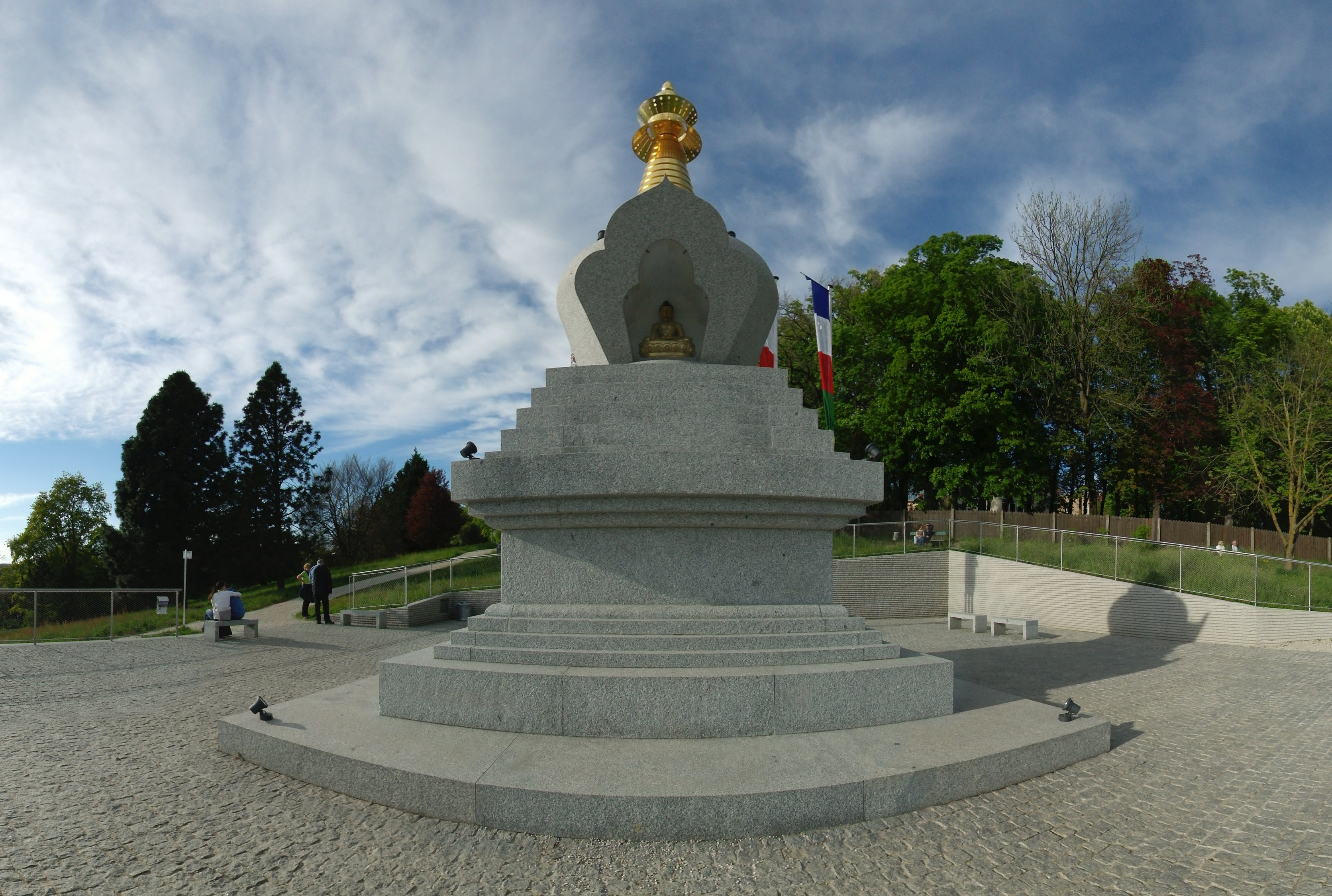 Panorama Stupa Linz